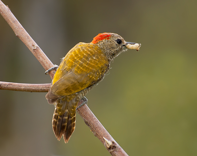 Piraju-SP - Brasil